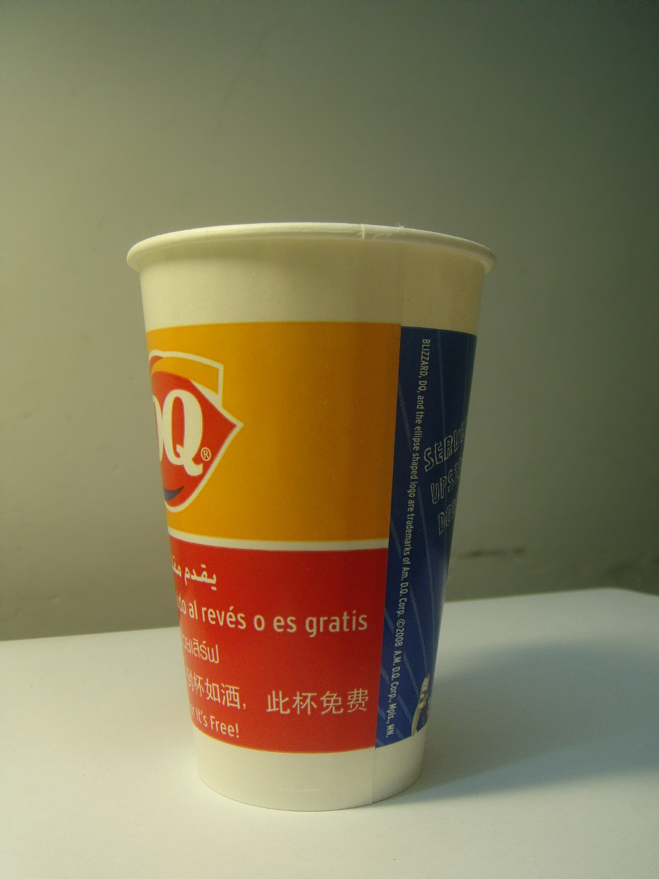 冰雪皇后的暴风雪冰淇淋，中杯